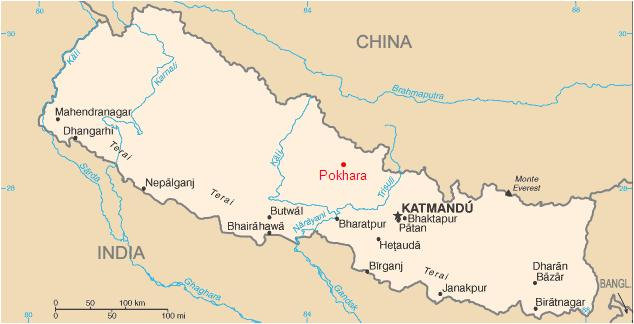 Localización de la ciudad de Pokhara en Nepal